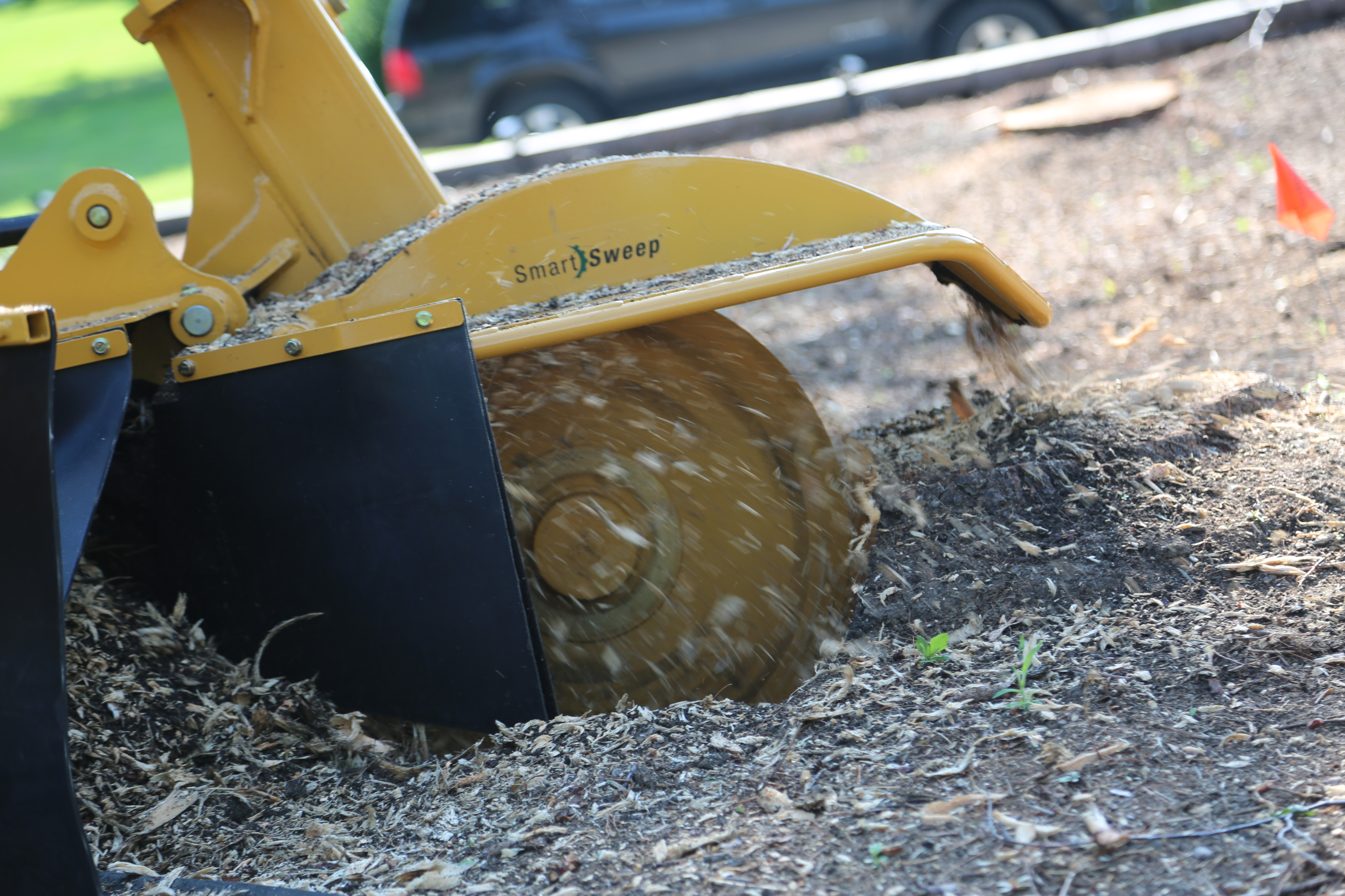 Stubbefreser i gang med å frese en stubbe etter trefelling.